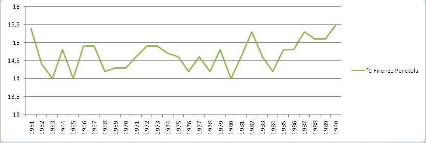 Stazione meteorologica di Firenze Peretola: andamento della temperatura media annua dal 1961 al 1990